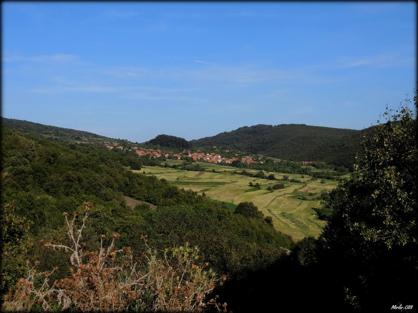 Церје